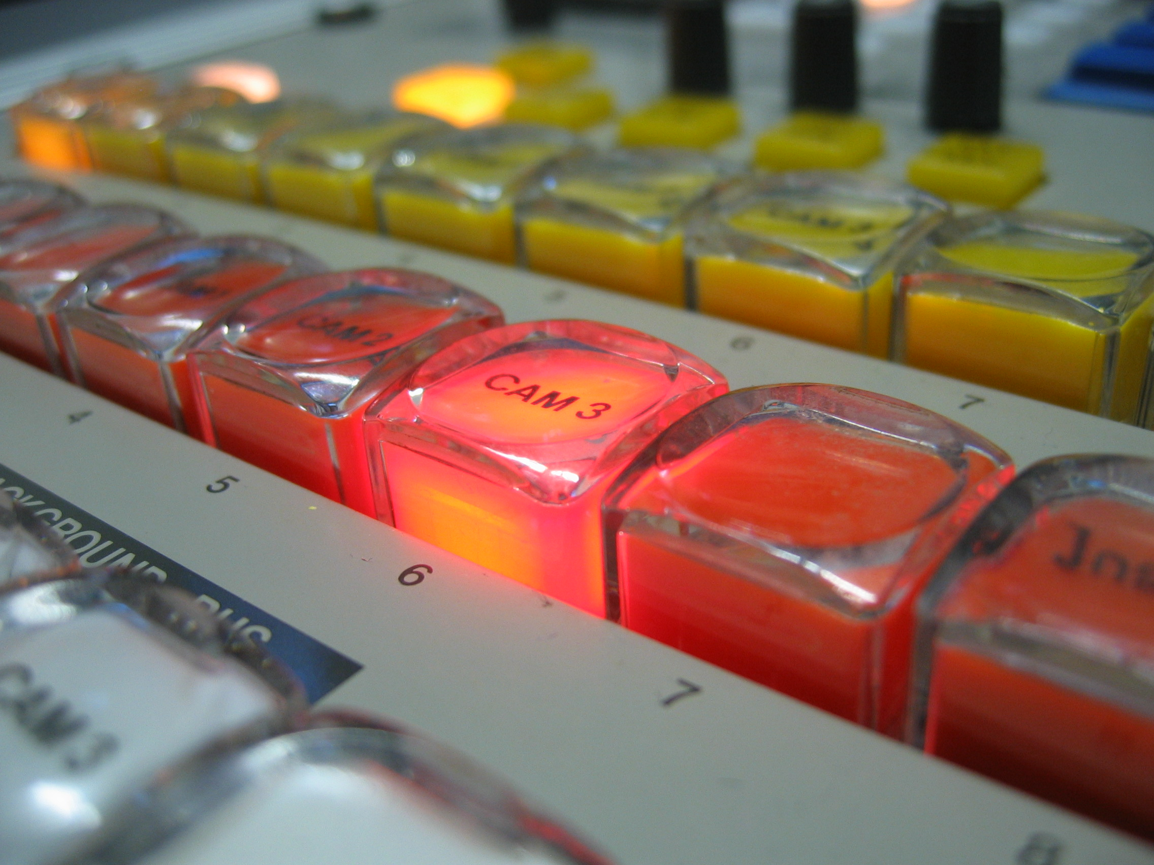 Tasten eines Bildmischers